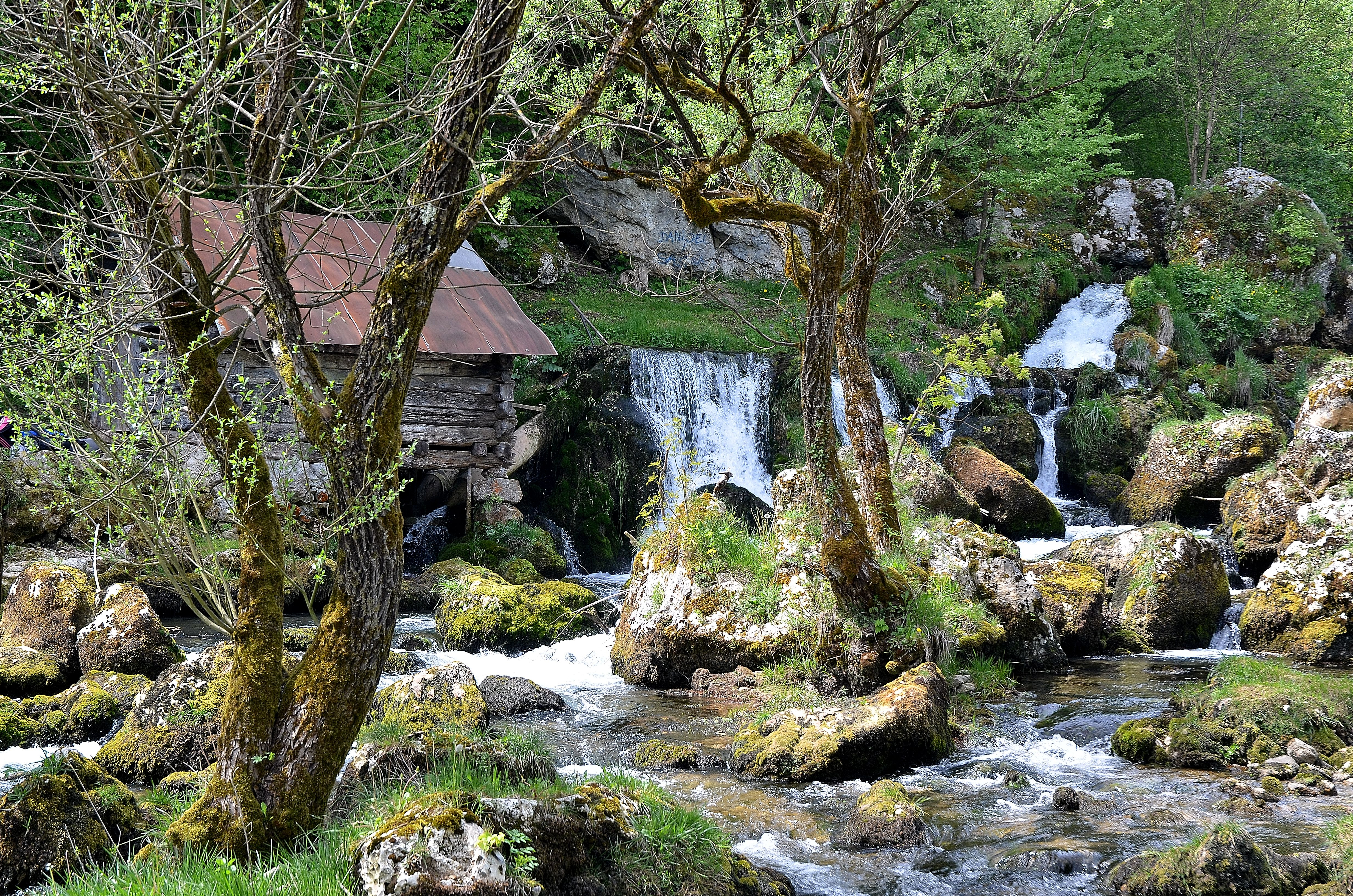 Воденице на Врбасу (Крупа на Врбасу), Бања Лука ID добра: NKD181 -Krupa na Vrbasu, mesto na oko 25 km južno od Banja Luke, smešteno. između dve klisure u Krupskom polju